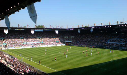 Stade de la Meinau lors de la réception de l'Olympique de Marseille (Saison 2007-2008)